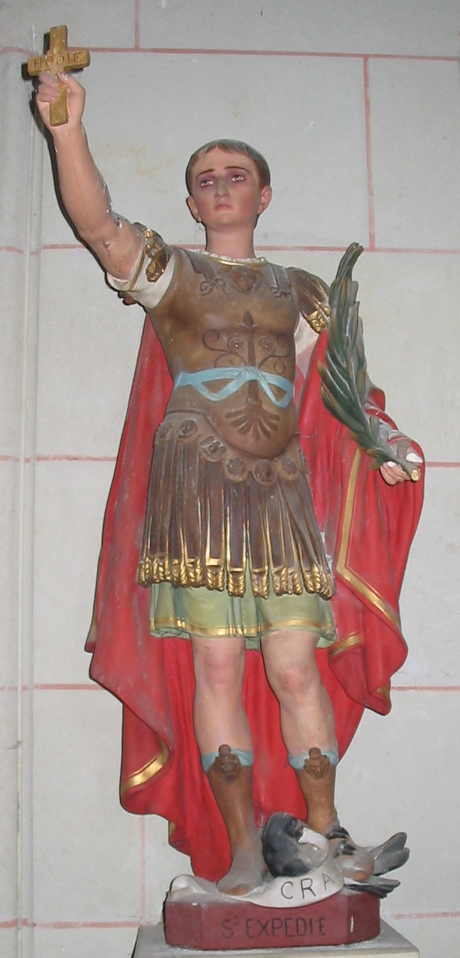 Statue de Saint Expedit, église de Brain-sur-Longuenée, Maine-et-Loire.